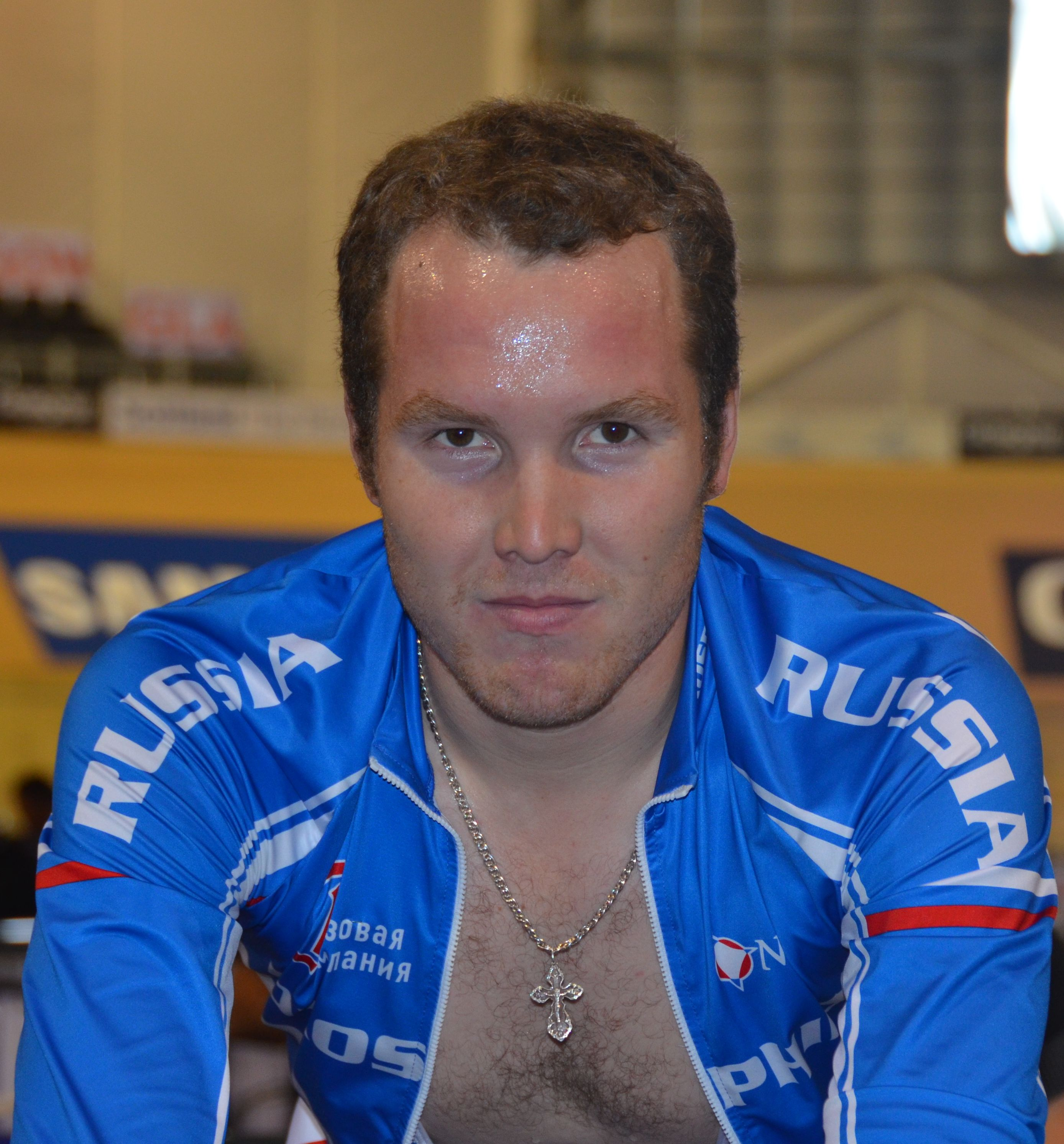 Dmitry Sokolov, russischer Radsportler